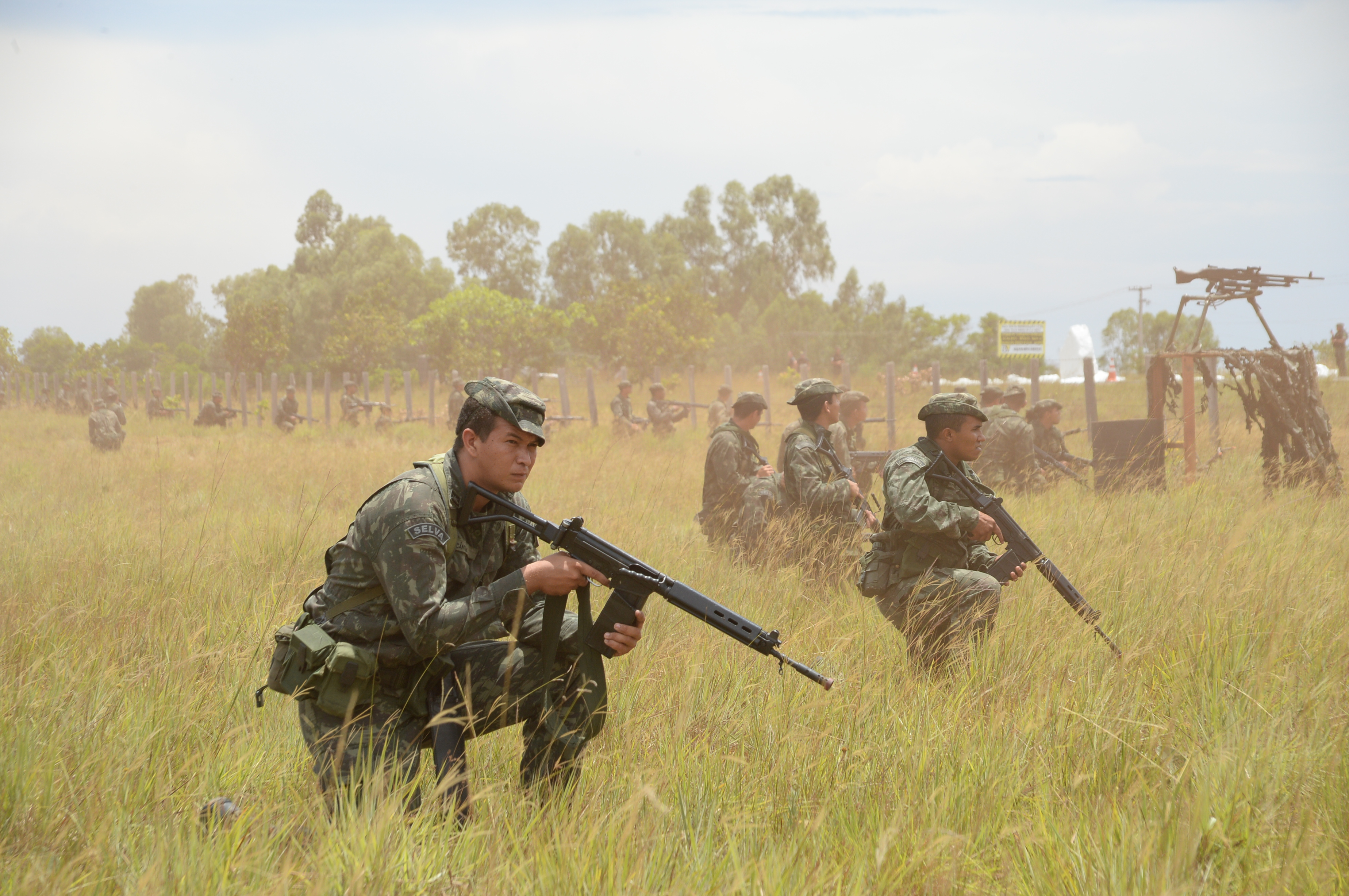 14/10/2014, Boa Vista - RO Fotos: Jorge Cardoso